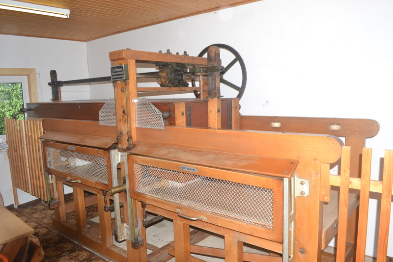 Kaltmangel bzw. Wäscherolle in Zaschendorf (heute Teil von Dresden), die noch zwei bis drei Mal pro Woche durch die Dorfbewohner benutzt wird.